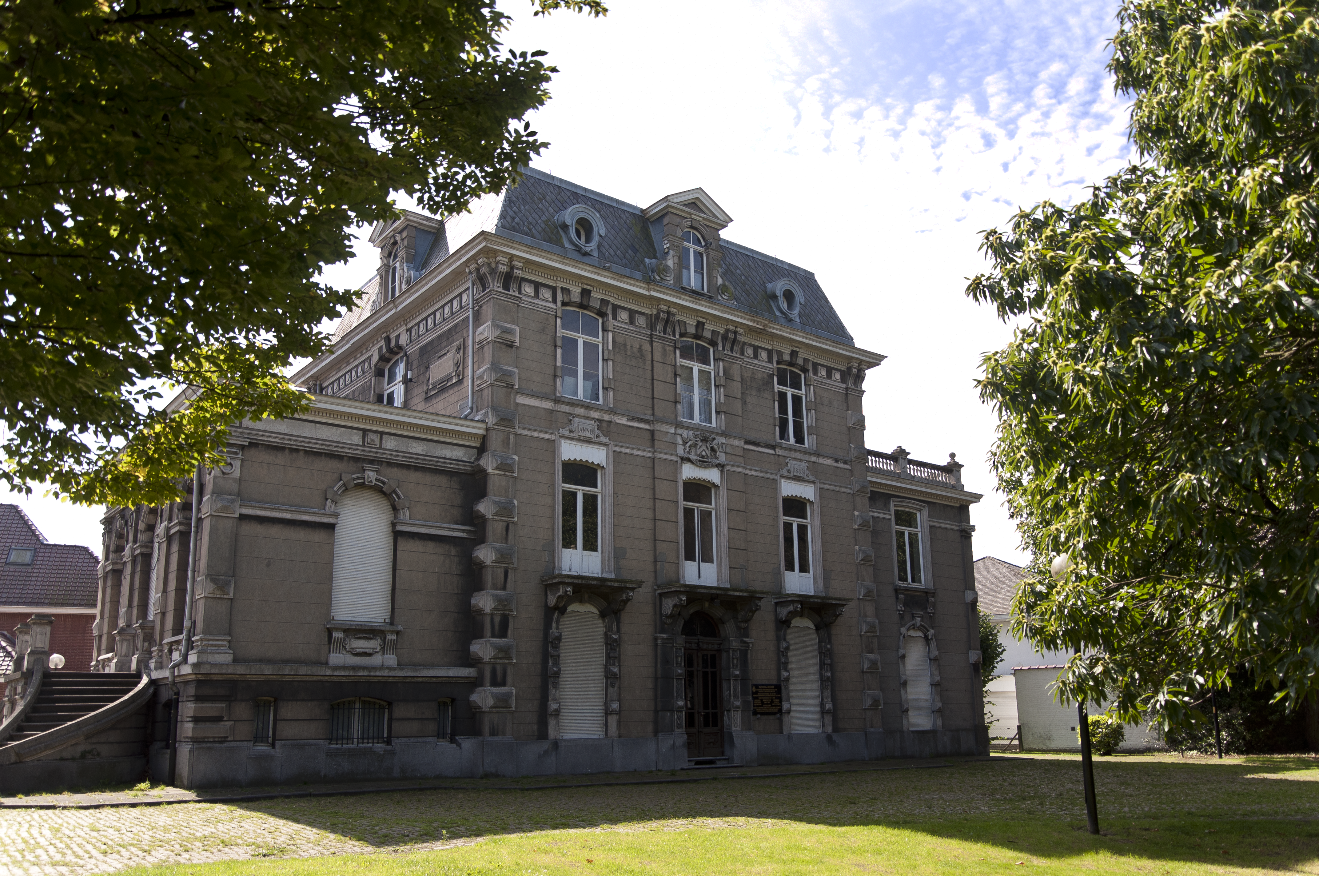 Kasteel de Pélichy te Gentbrugge, België